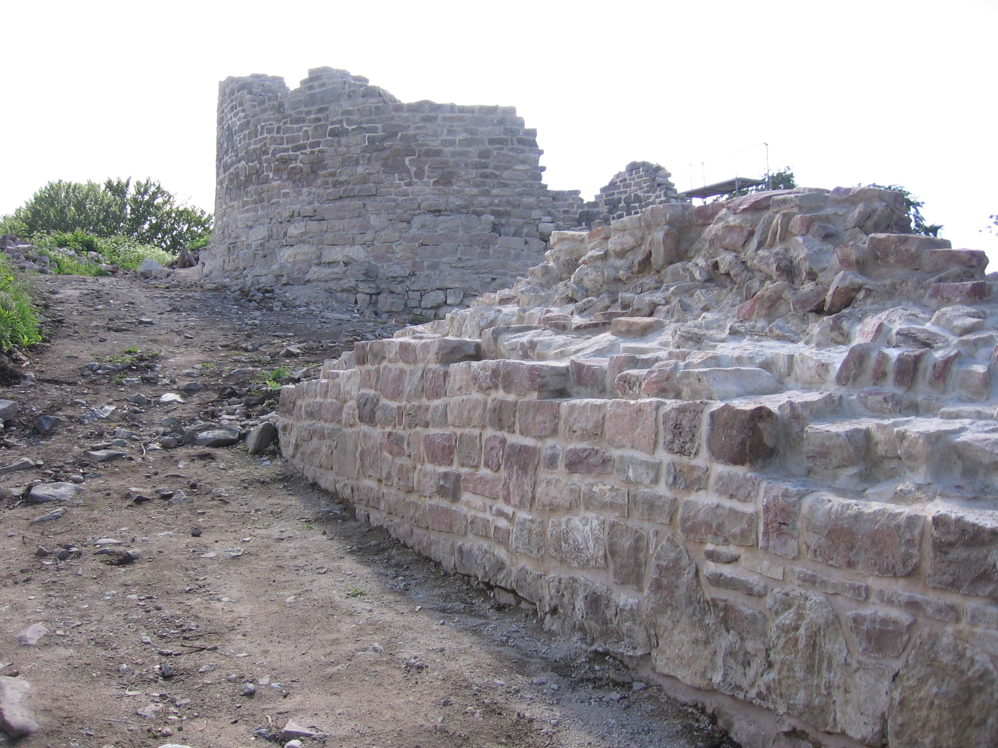 Burgruine Osterburg. Aktueller Stand der Freilegungsarbeiten.